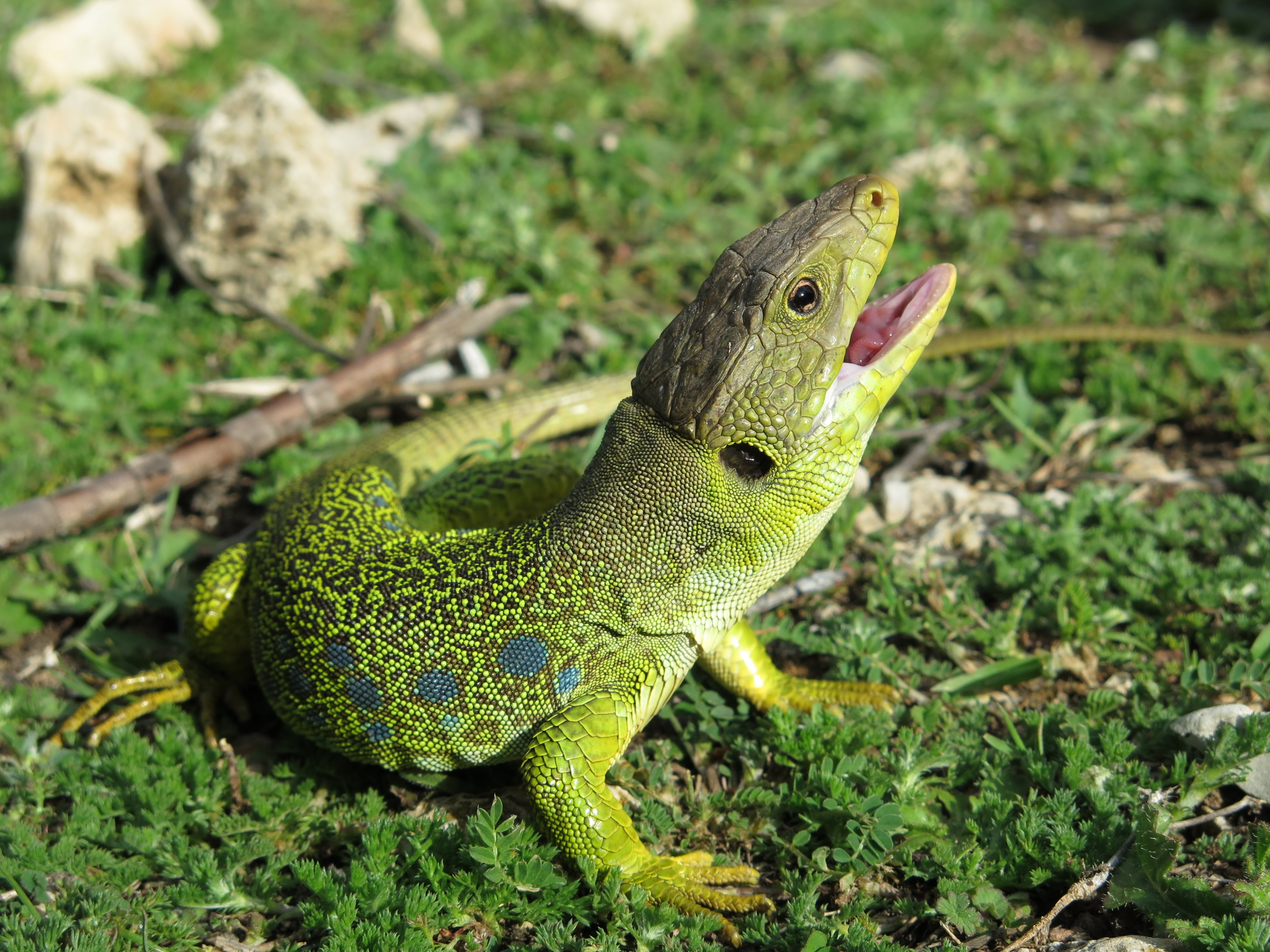 Lagarto ocelado abriendo la boca, cerca del arroyo de Despeñaburros, Sierra Sur de Jaén.